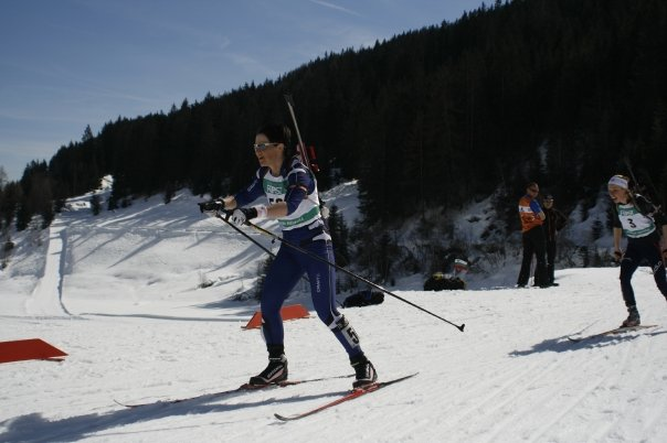 See Title